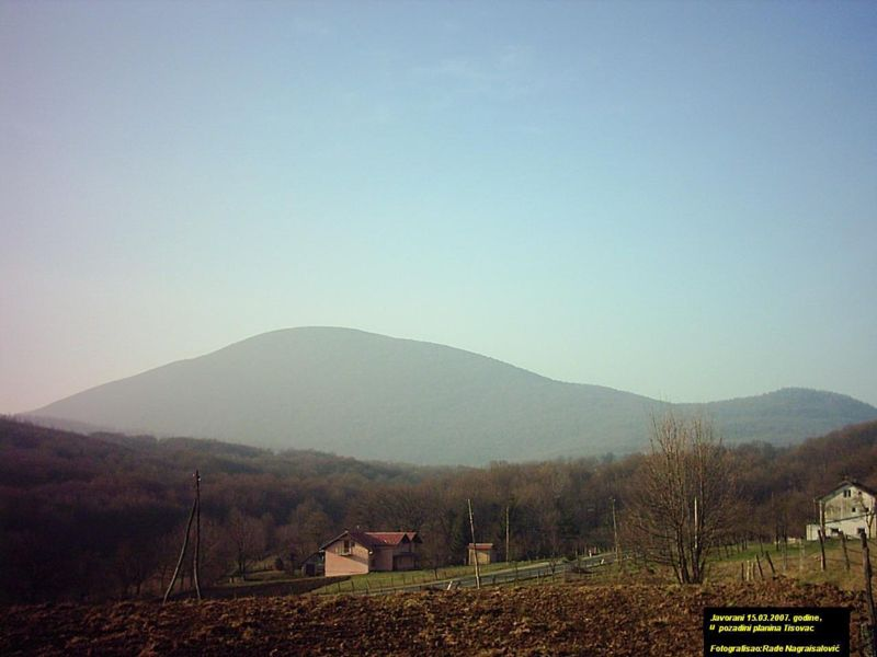 Планина Тисовац (Јаворани)